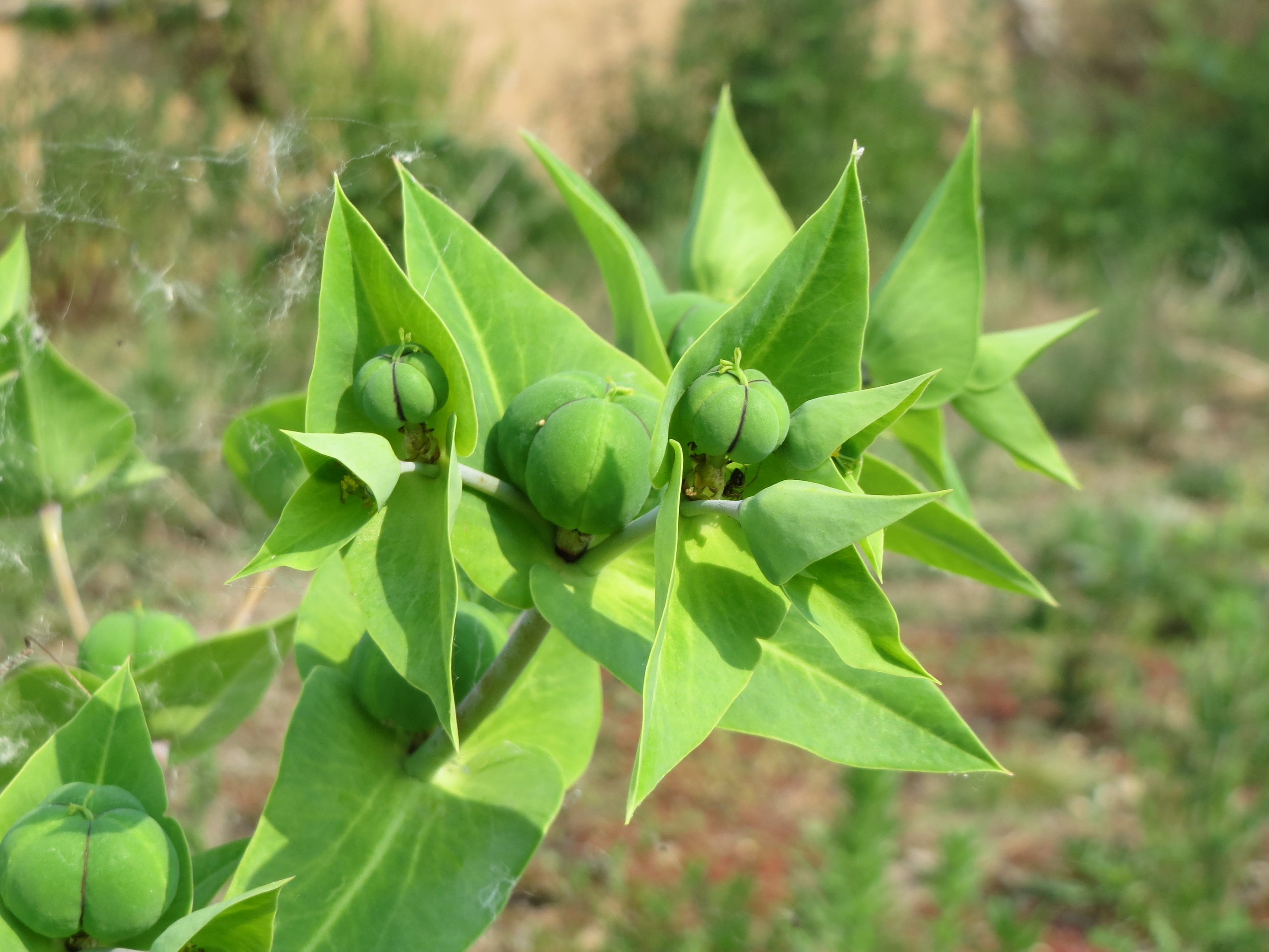 Kreuzblättrige Wolfsmilch (Euphorbia lathyris) auf einem Schuttplatz bei Neulußheim (Gemarkung Altlußheim)